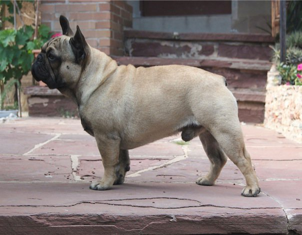 Mi Gran Amigo El General, Mi Gran Amigo breeder